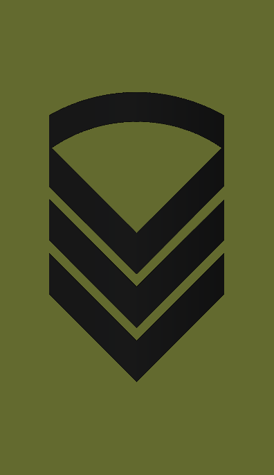 Distinksjon Oversersjant